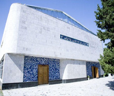 Тоҷикӣ: Осорхонаи тибби тоҷик дар осоишгоҳи "Зумрад", Исфара